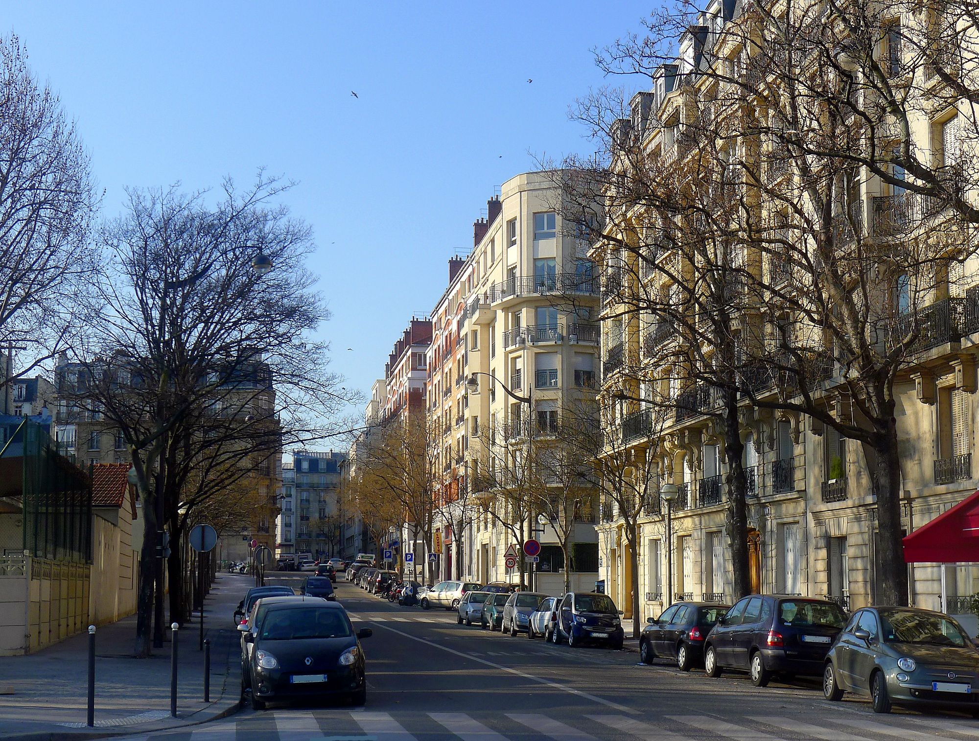 Boulevard Murat - Paris XVI